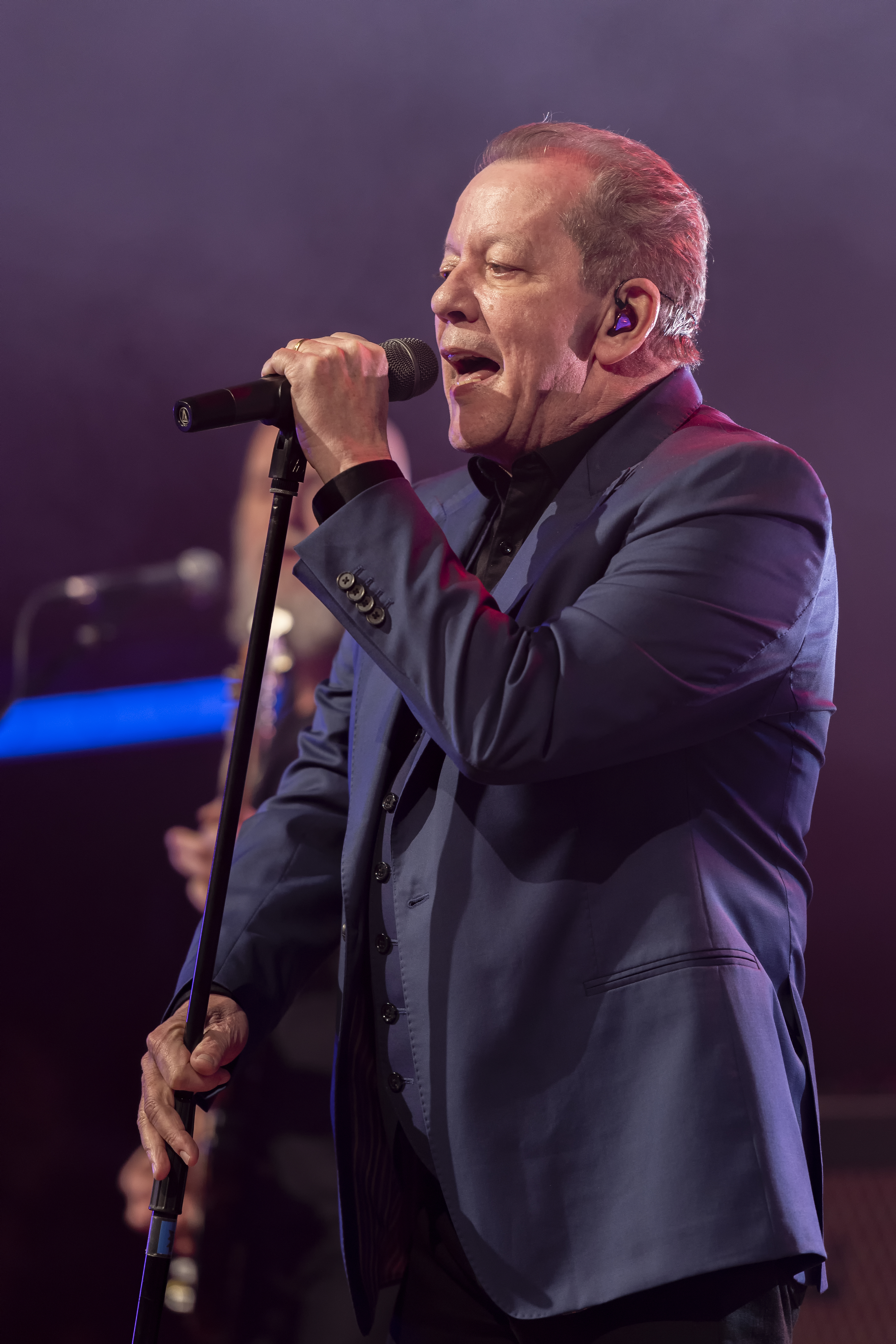 Walter Grootaers in 2019 met De Kreuners in de Roma in Borgerhout